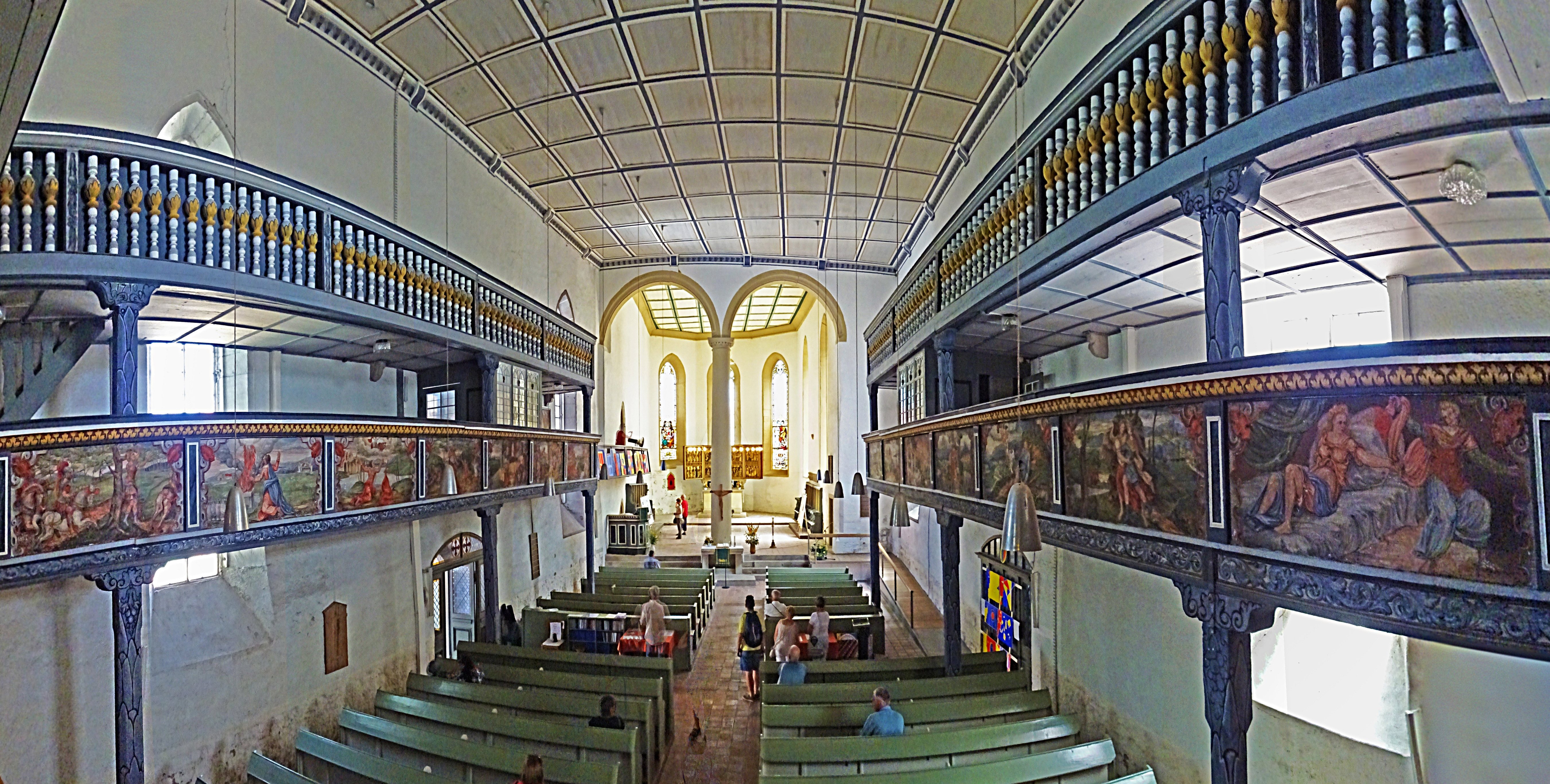 Innenraum Panorama der Bonifatiuskirche (Sömmerda), Blick nach Osten